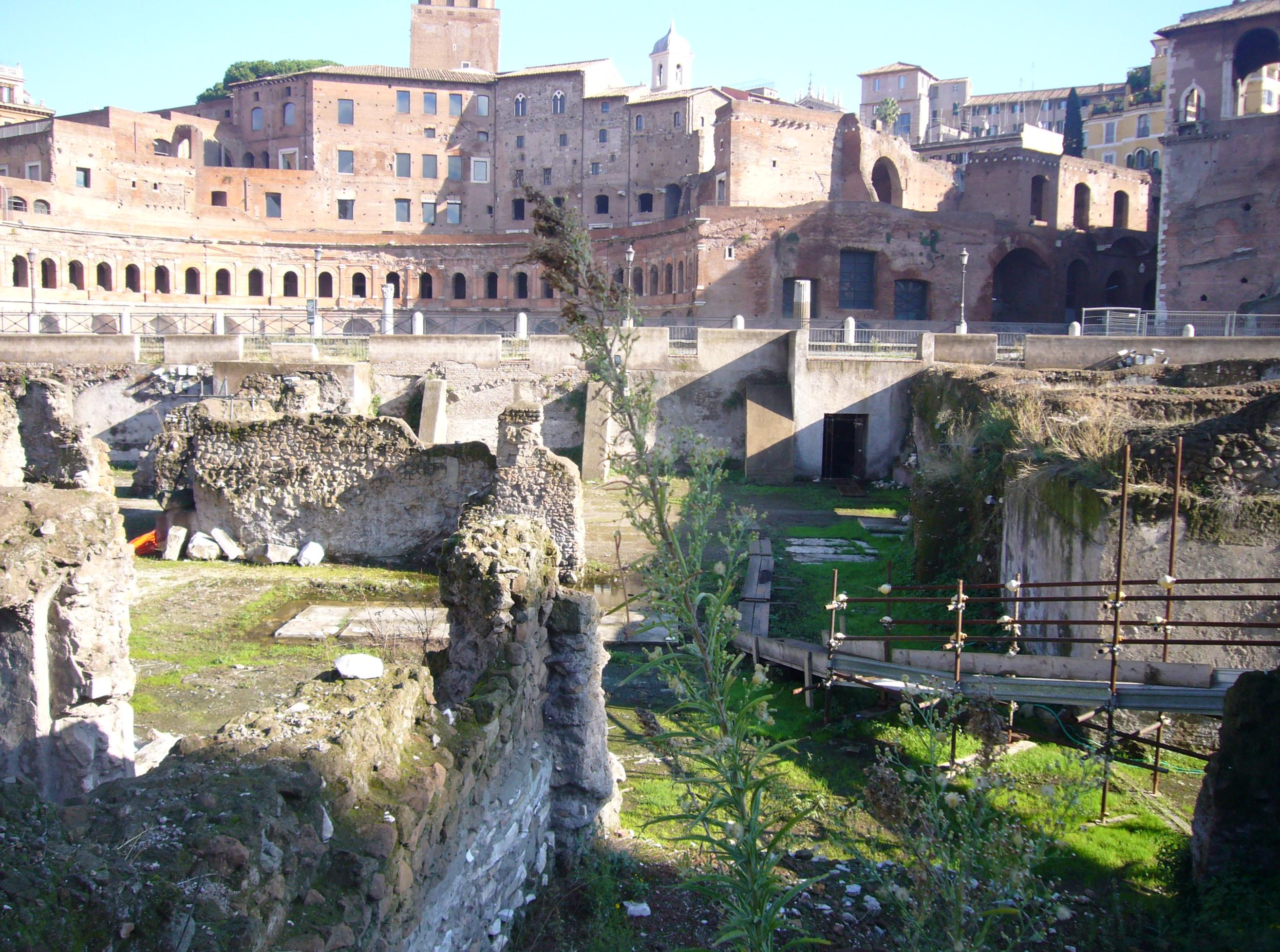 Roma, scavi nel quartiere Alessandrino al Foro Traiano (situazione 2008). Fondazioni degli edifici del quartiere demolito, appoggiate sul piano di epoca imperiale.